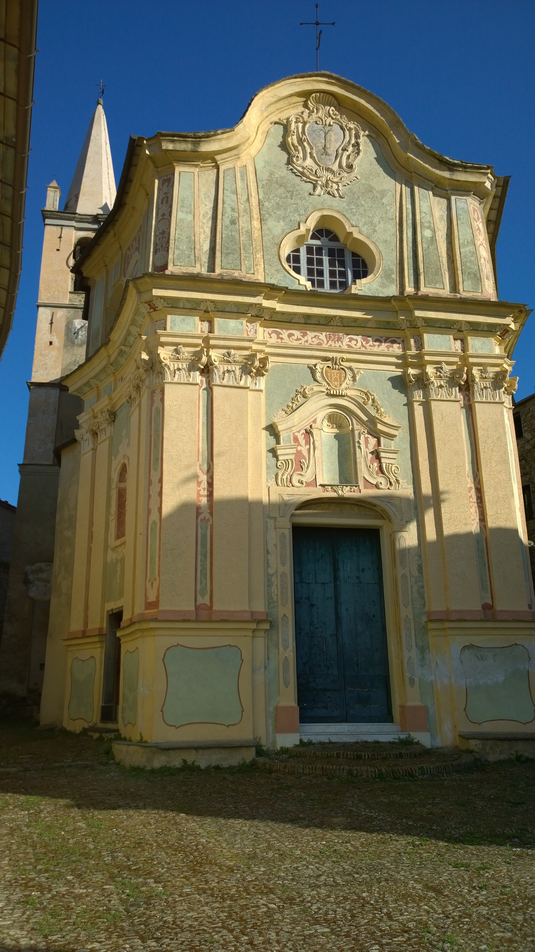 Pietrabruna, Ortsteil Torre Paponi. Die zentrale Kirche "S.S. Cosma e Damiano" im Ortskern aus dem 18. Jahrhundert